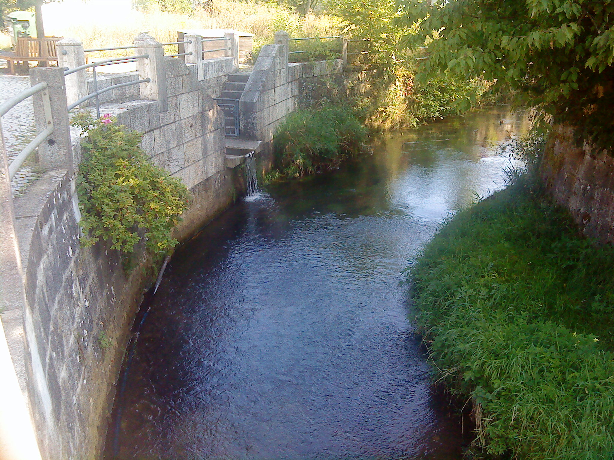 Der deutlich kleinere Pegnitzbach (kleiner Wasserfall) aus der Pegnitzquelle "mündet" in die Fichtenohe